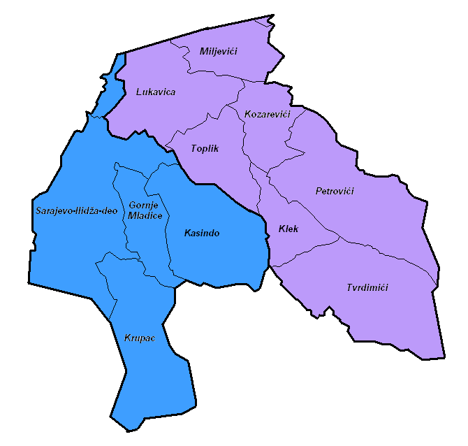 Мапа настала спајањем следећих мапа: Kasindo.PNG Lukavica.PNG